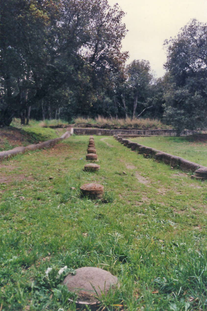 colonnato villa di plinio